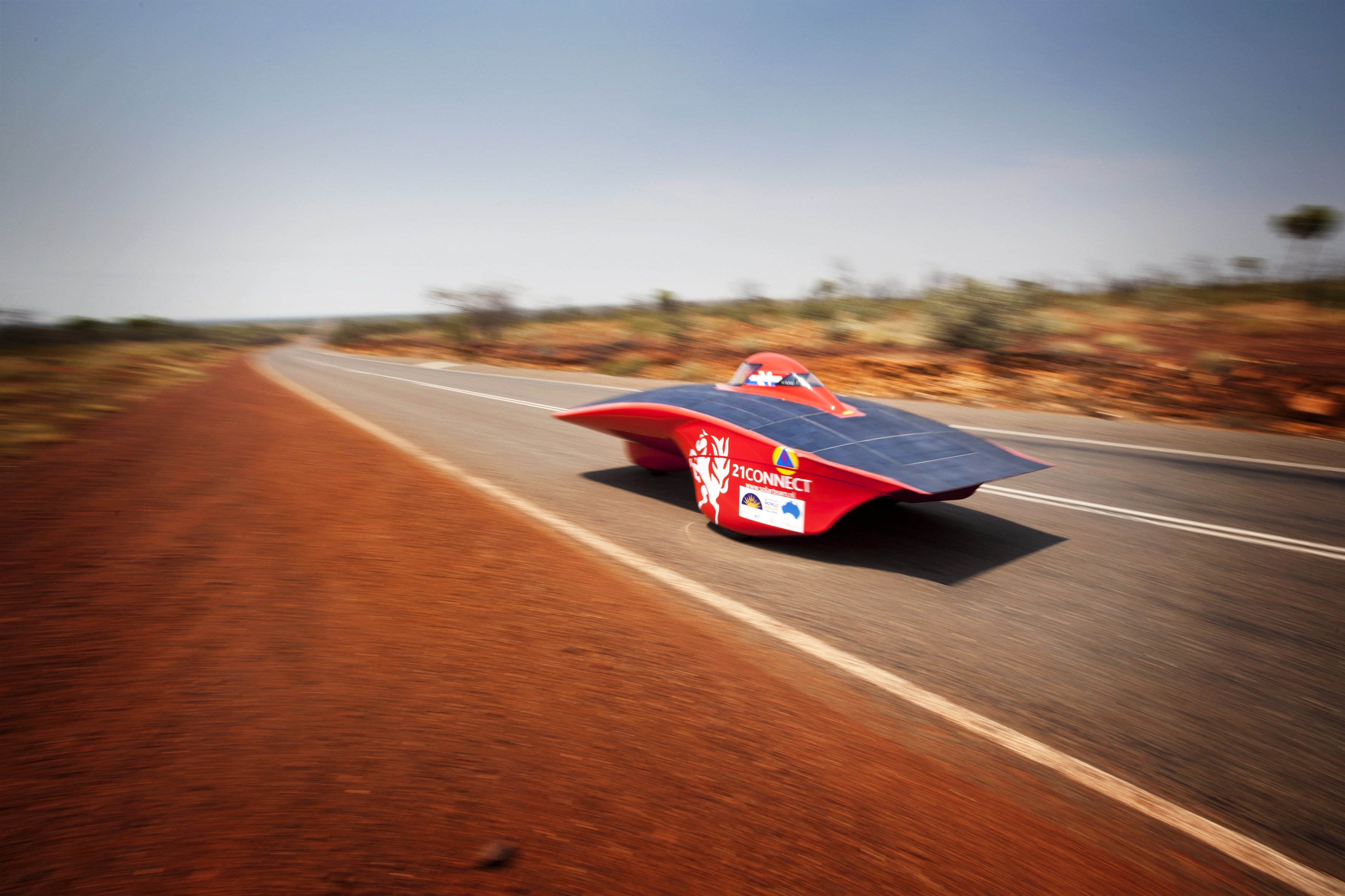 guillermo gay